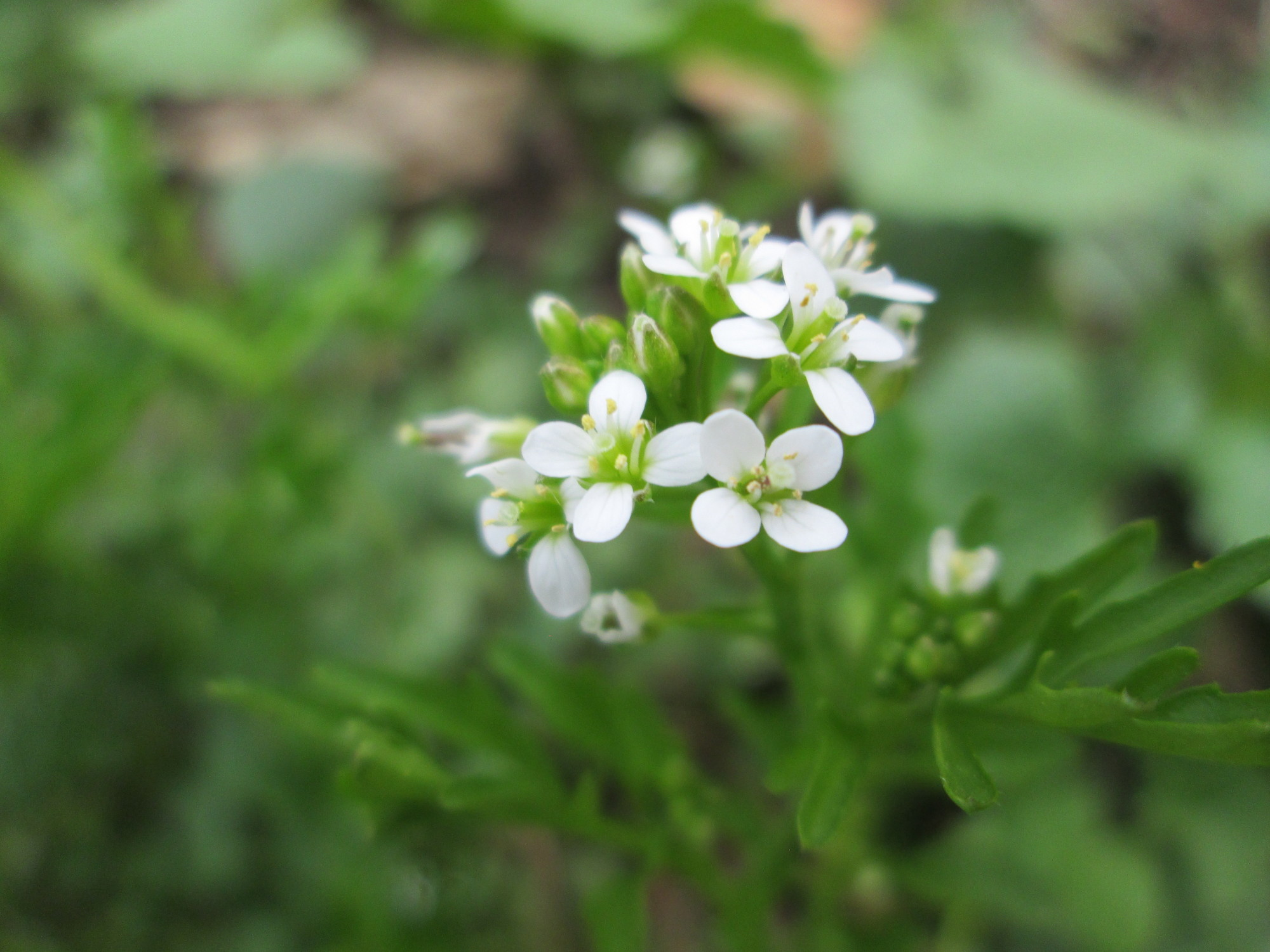 Wald-Schaumkraut (Cardamine flexuosa) im Landschaftsschutzgebiet „Drahtzugweiher und das Habsterwiesental“ in Alt-Saarbrücken